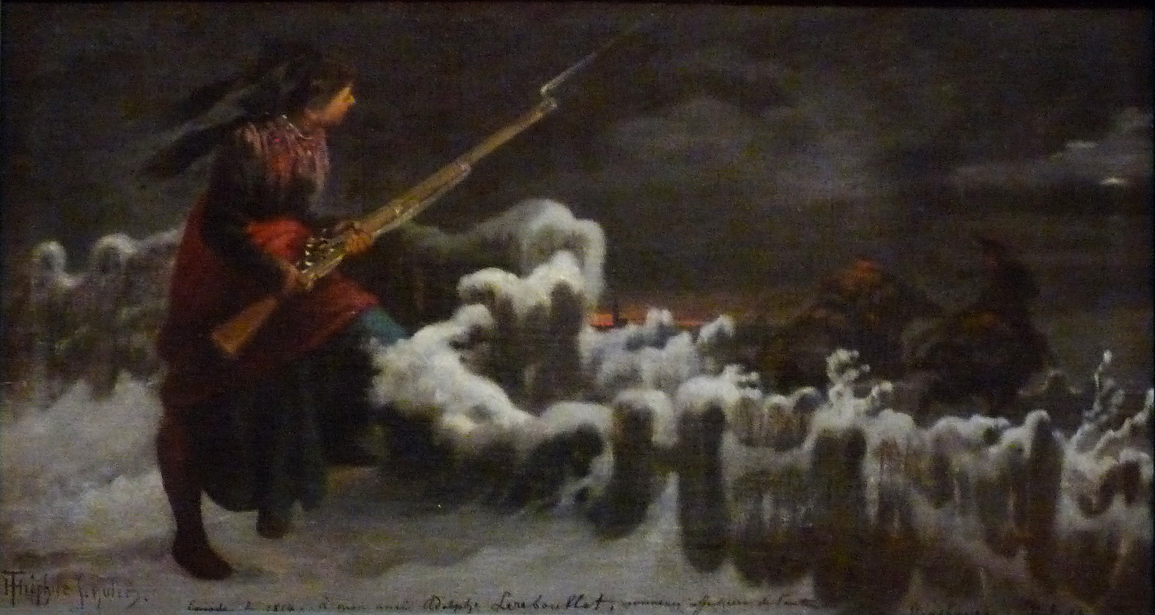 Théophile Schuler, Episode de la guerre de 1814, huile sur toile, 1870, Musée des beaux-arts de Strasbourg.